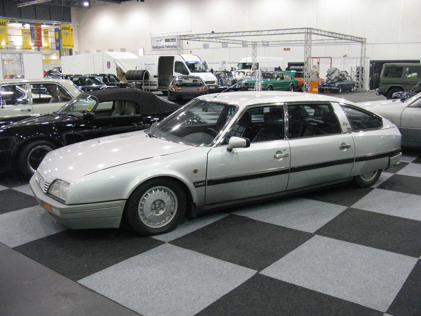 Citroen CX Turbo Prestige